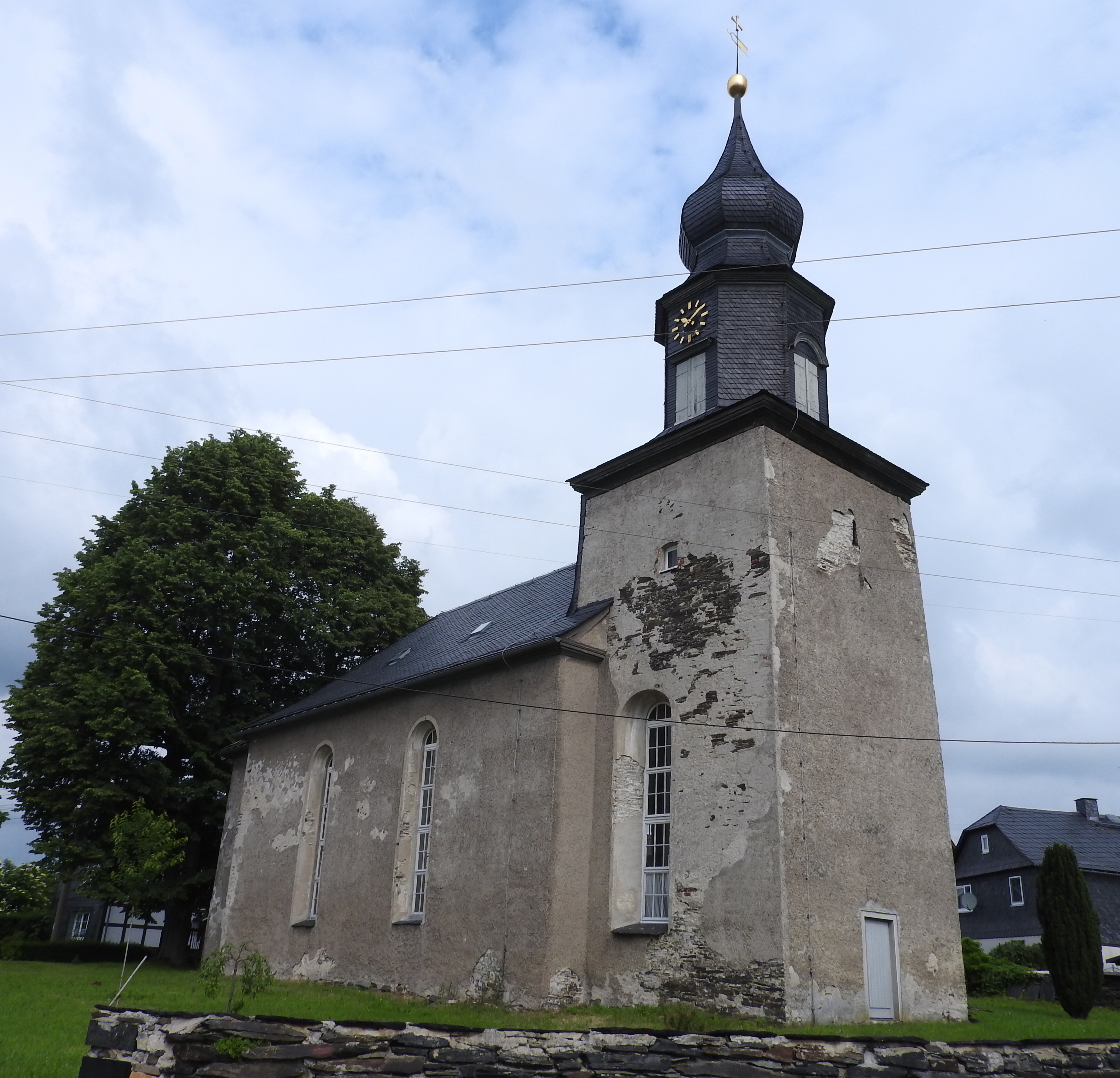 Kirche in Oßla, Thüringen